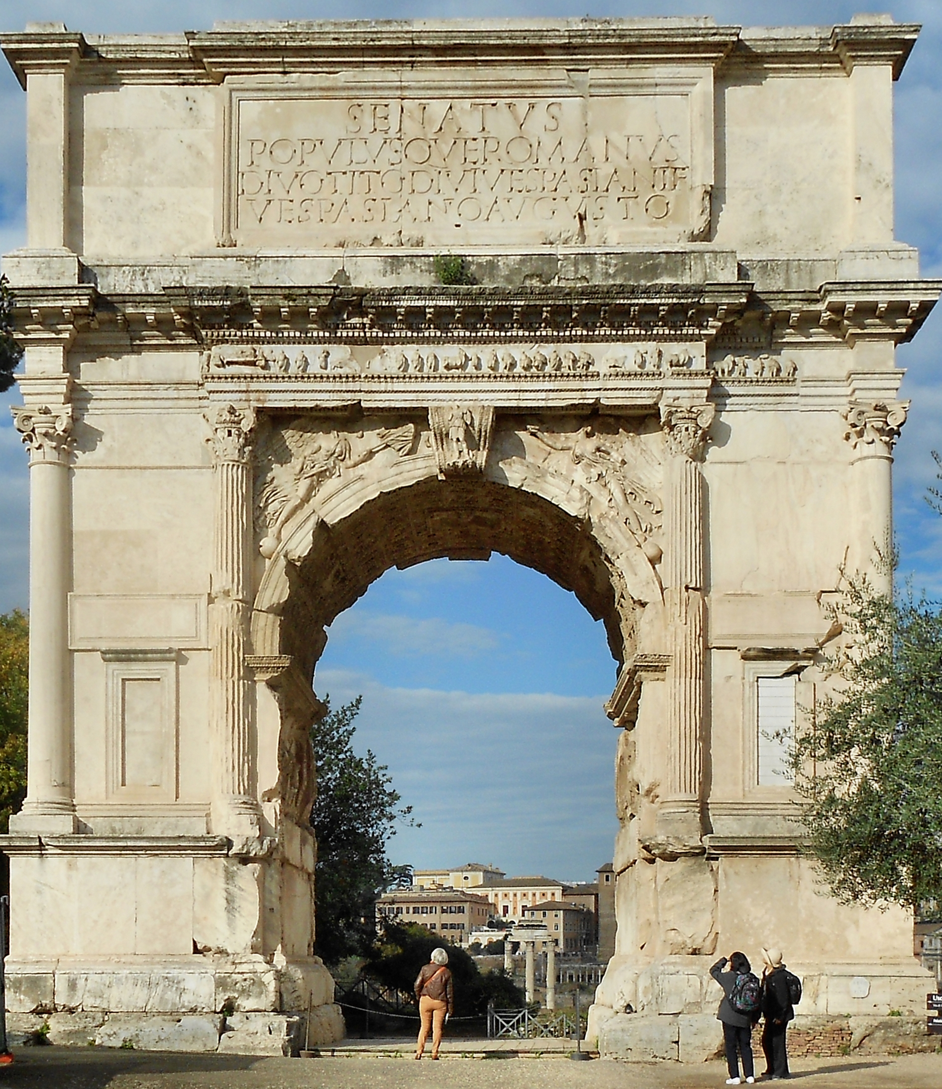 Titusbogen Frontansicht (Eingang zum Forum Romanum)